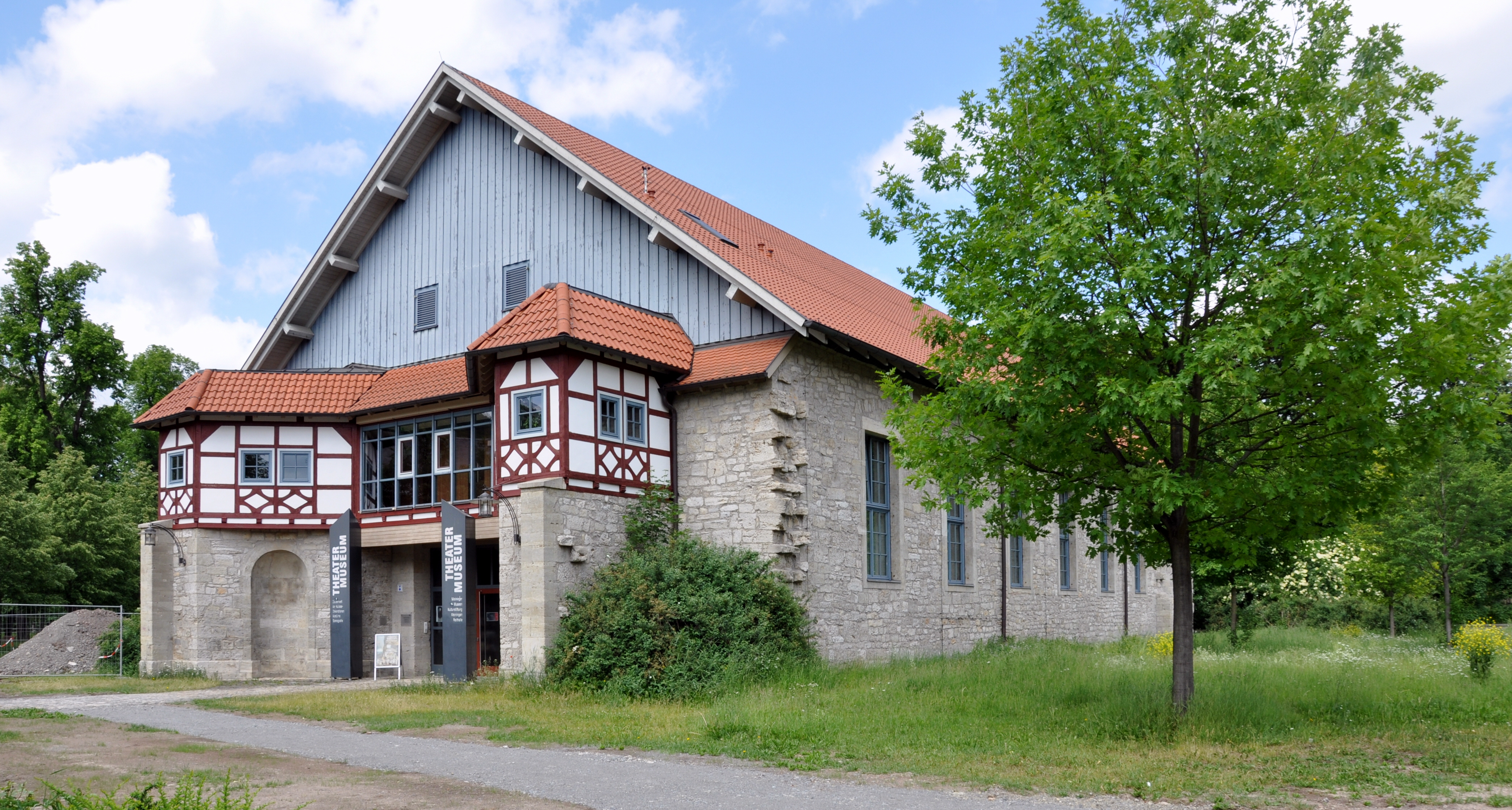 Meiningen, Theatermuseum